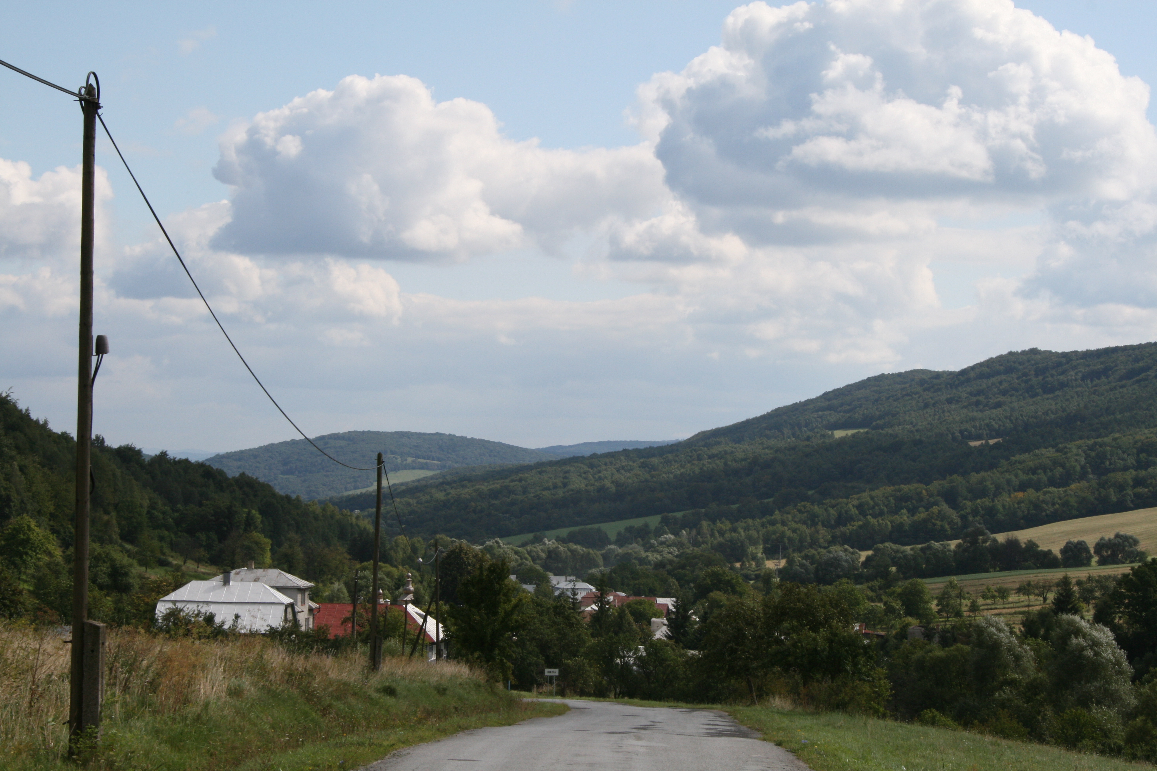 Dedinka v údoli, veduta v Nízkych Beskydach